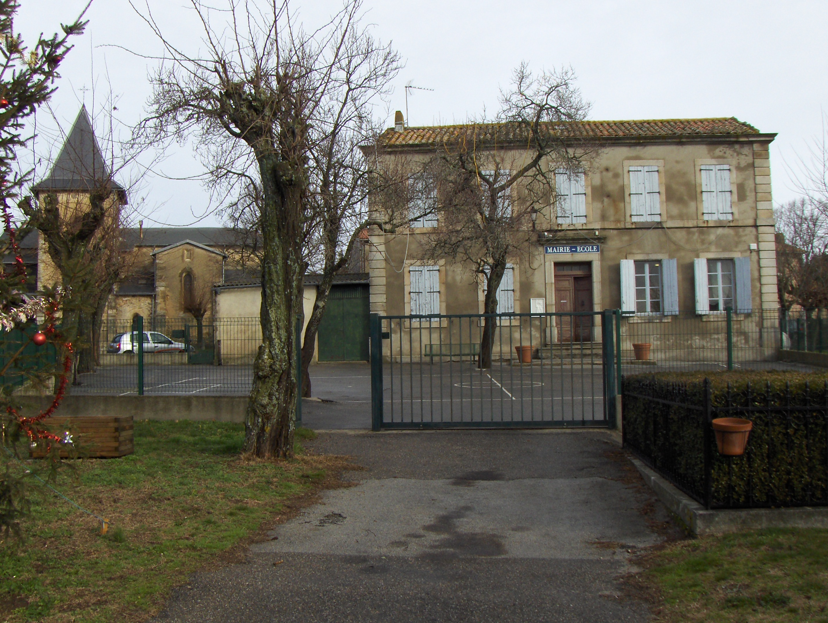 Vue de Brousses